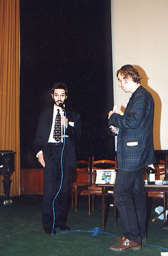 Антон Носик и Лёха Андреев на сцене. Награждение лауреатов сетевого литературного конкурса "ТЕНЁТА-Ринет'98"